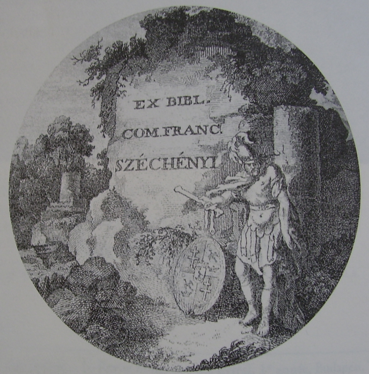 Ex libris of magyar patriot Ferenc Széchényi (XIXe c.)